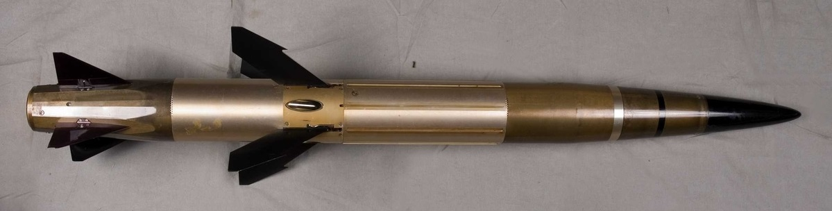 Robot till robotsystem 70 tillhörande Armémuseum Identifikationsnr: AM.094710